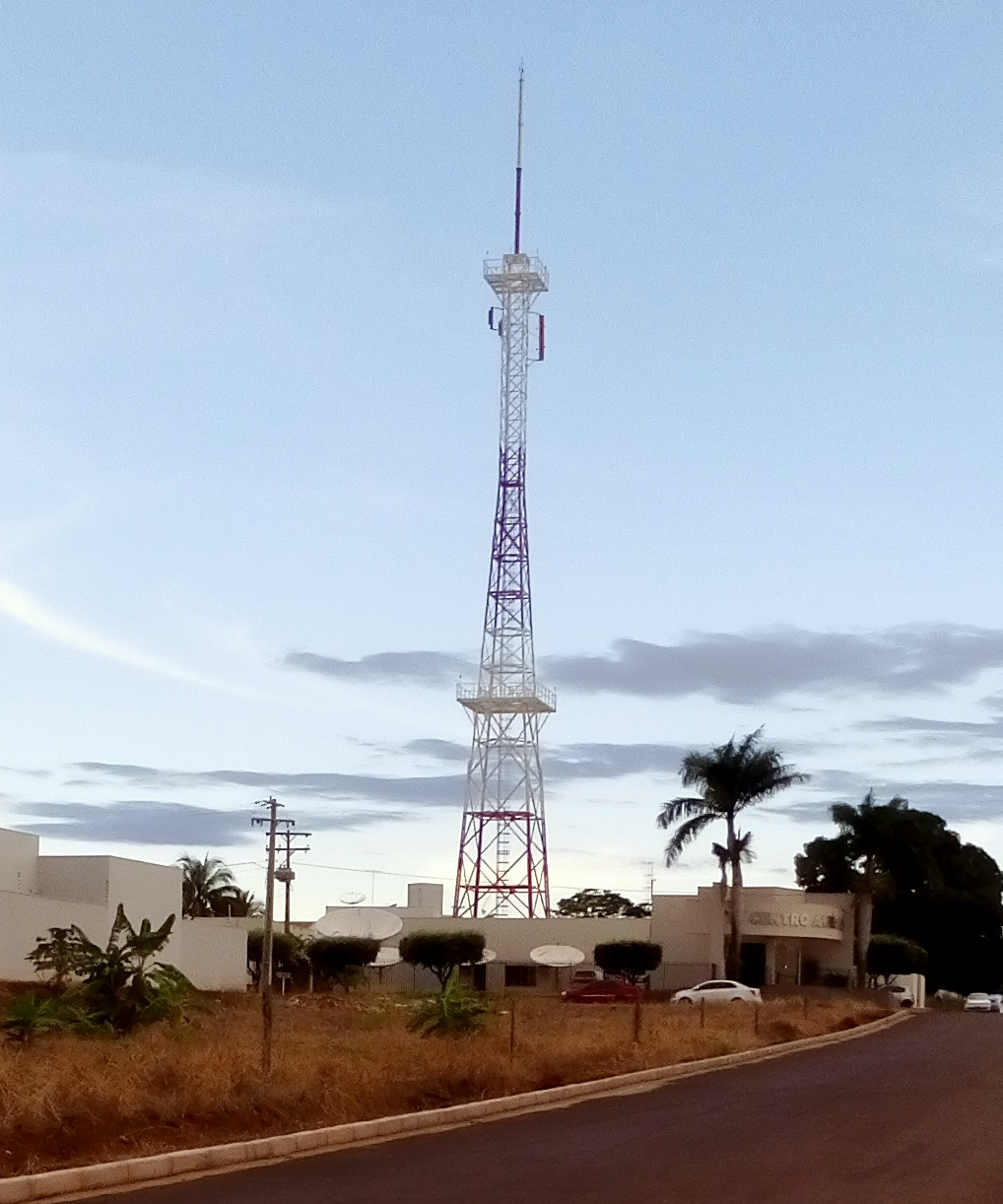 Sede da TV Centro América, no bairro Jardim Amélia, em Tangará da Serra.